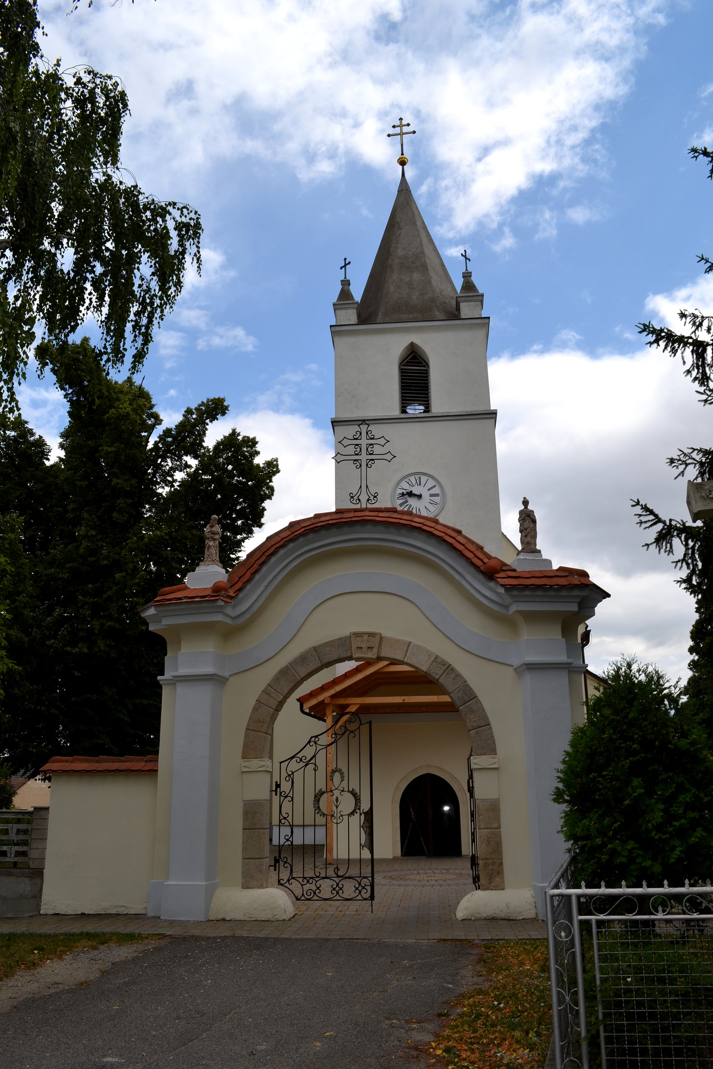 Slovenský Grob, Kostol svätého Jána Krstiteľa; čelný pohľad